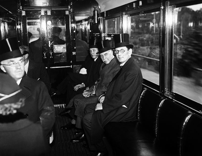 Södertunneln invigs. (Tunnelbanelinjen till Skarpnäck förlängd från Ringvägen (Skanstull) till Slussen.) Interiör från en av vagnarna med passagerare; längst till höger borgarrådet Yngve Larsson.